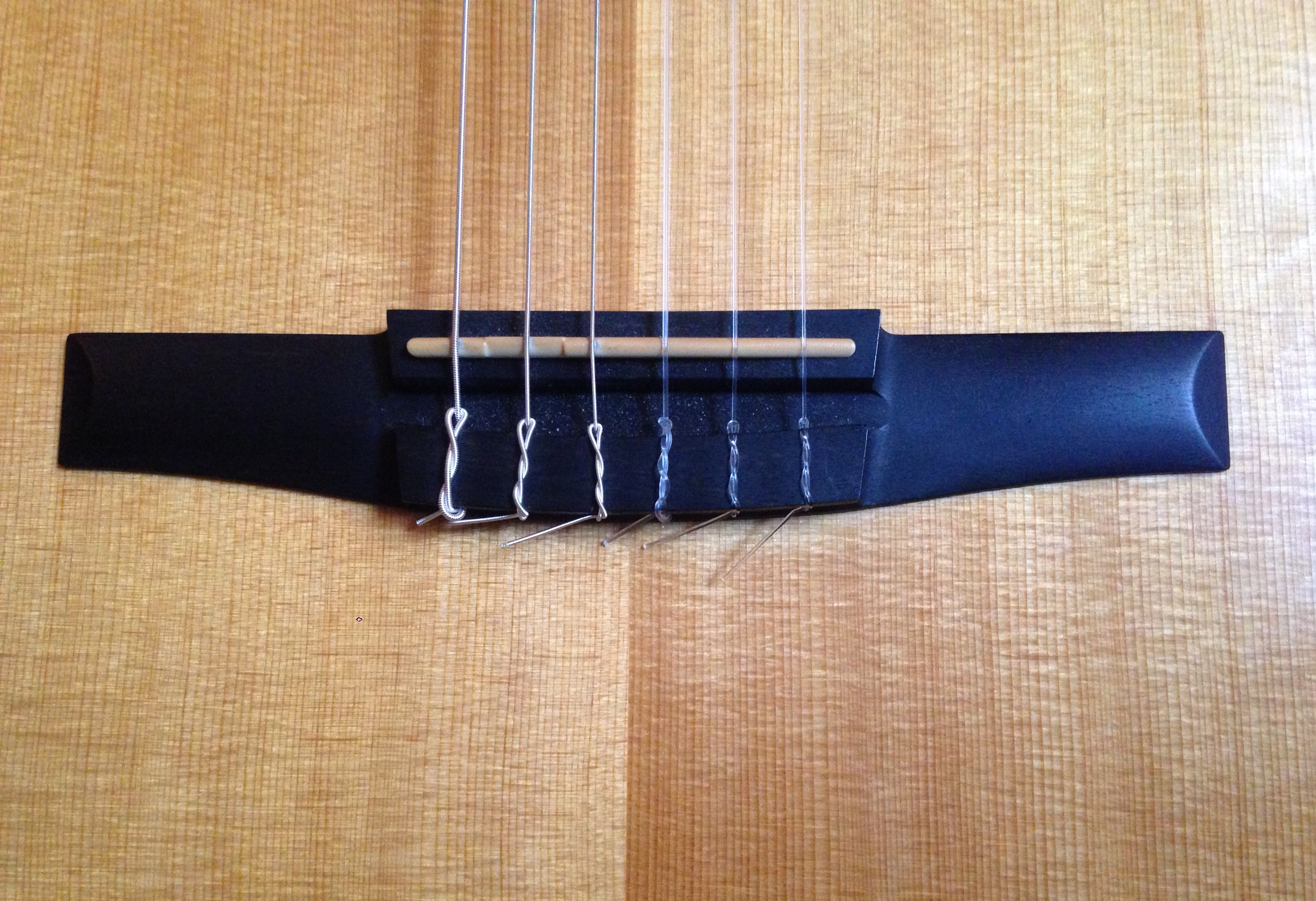 ponte della chitarra classica Taylor